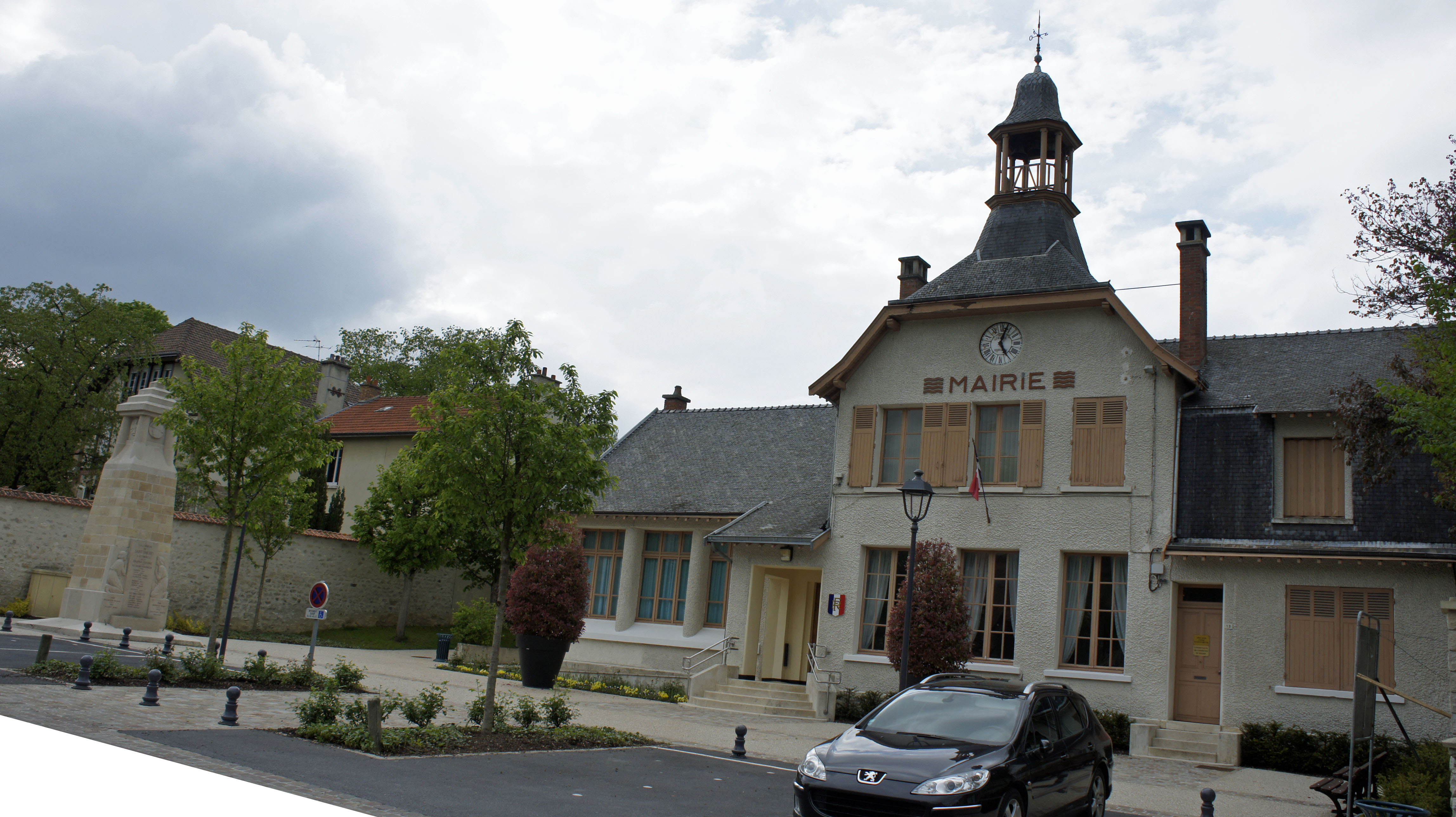 Place de la Mairie à St-Thierry avec son monument aux morts.